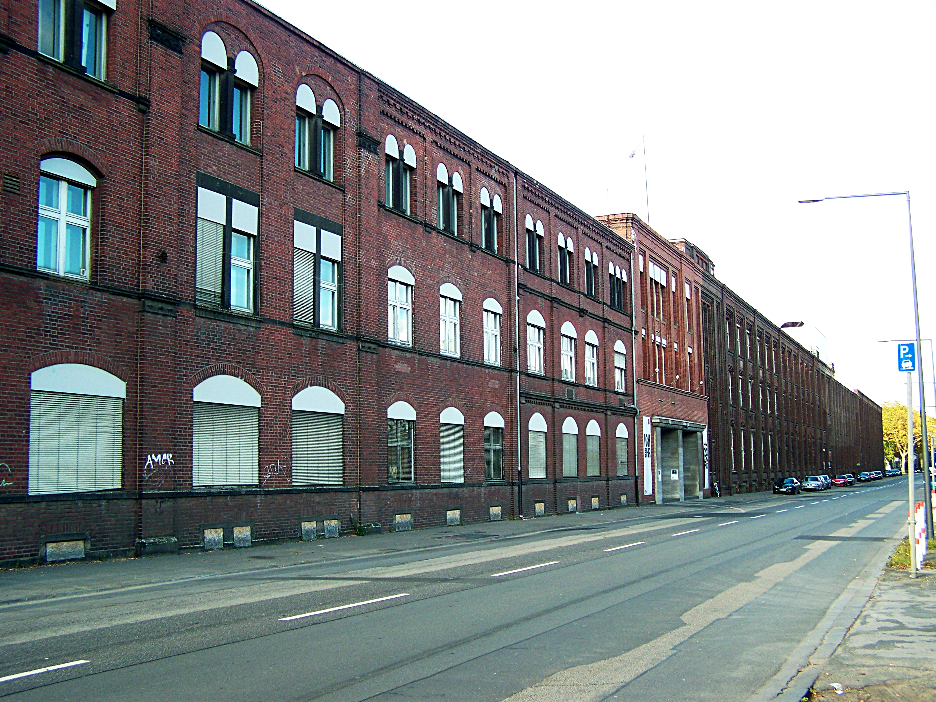 Verwaltungsgebäude (Gebäude 23), Deutz-Mülheimer Str. 147–155 This is a photograph of an architectural monument.